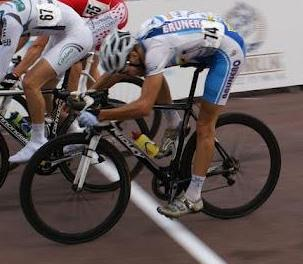 Matteo Draperi del Team Brunero nel 2012 su una bici ridley al giubileo Aleksandr Vinokurov a Monaco